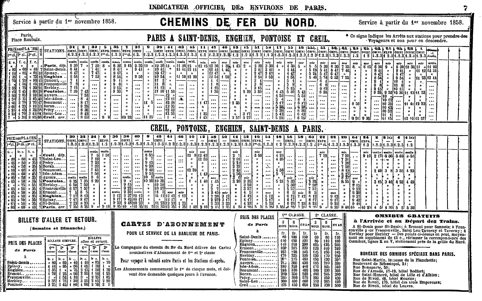 Horaire des trains Paris - Engien - Pontoise - Creil, service à compter du 1er novembre 1858. On notera le cadencement entre Paris et Pontoise, renforcé entre Paris et Enghien.